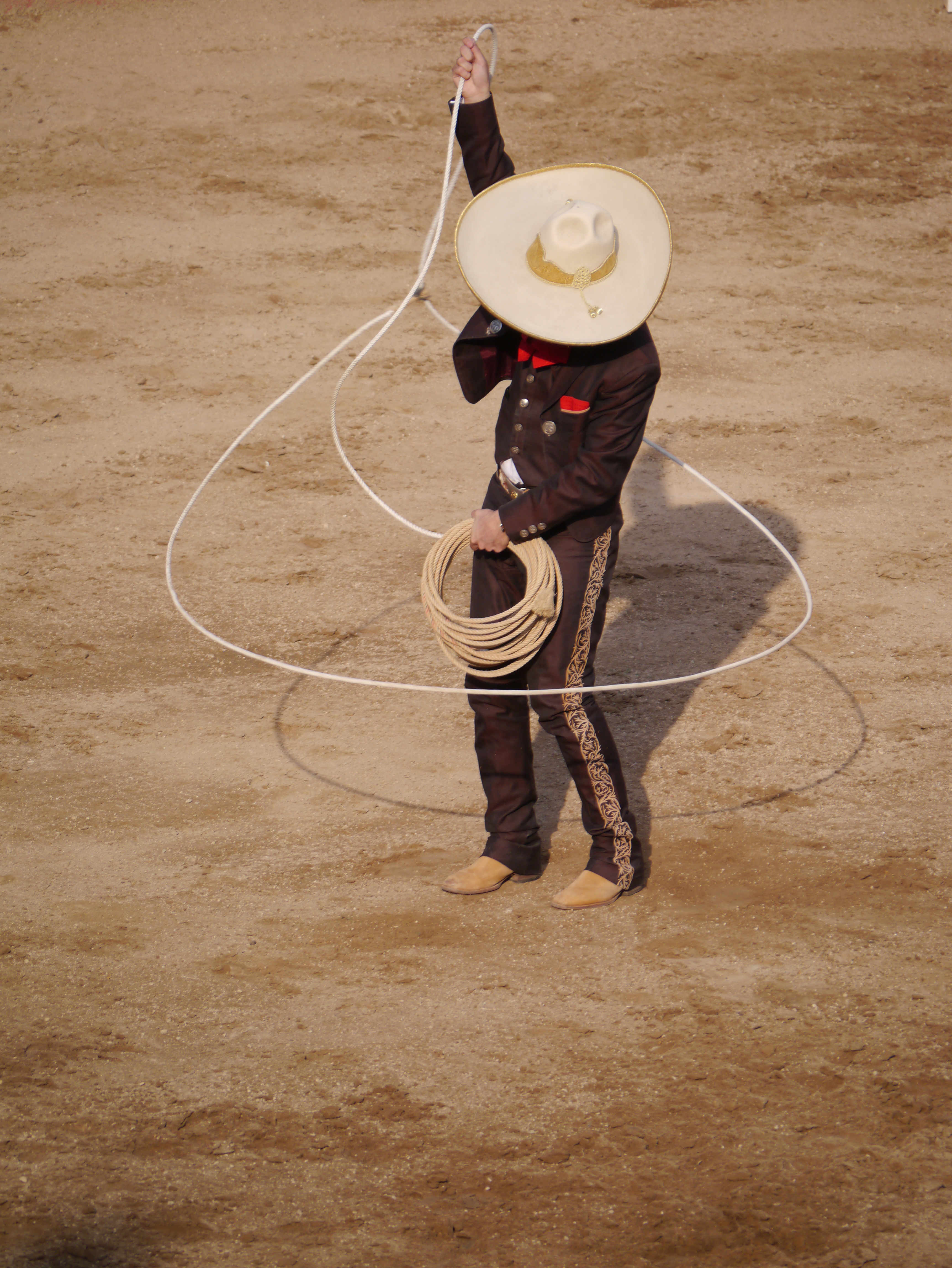 flóreame...